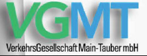 Logo VGMT